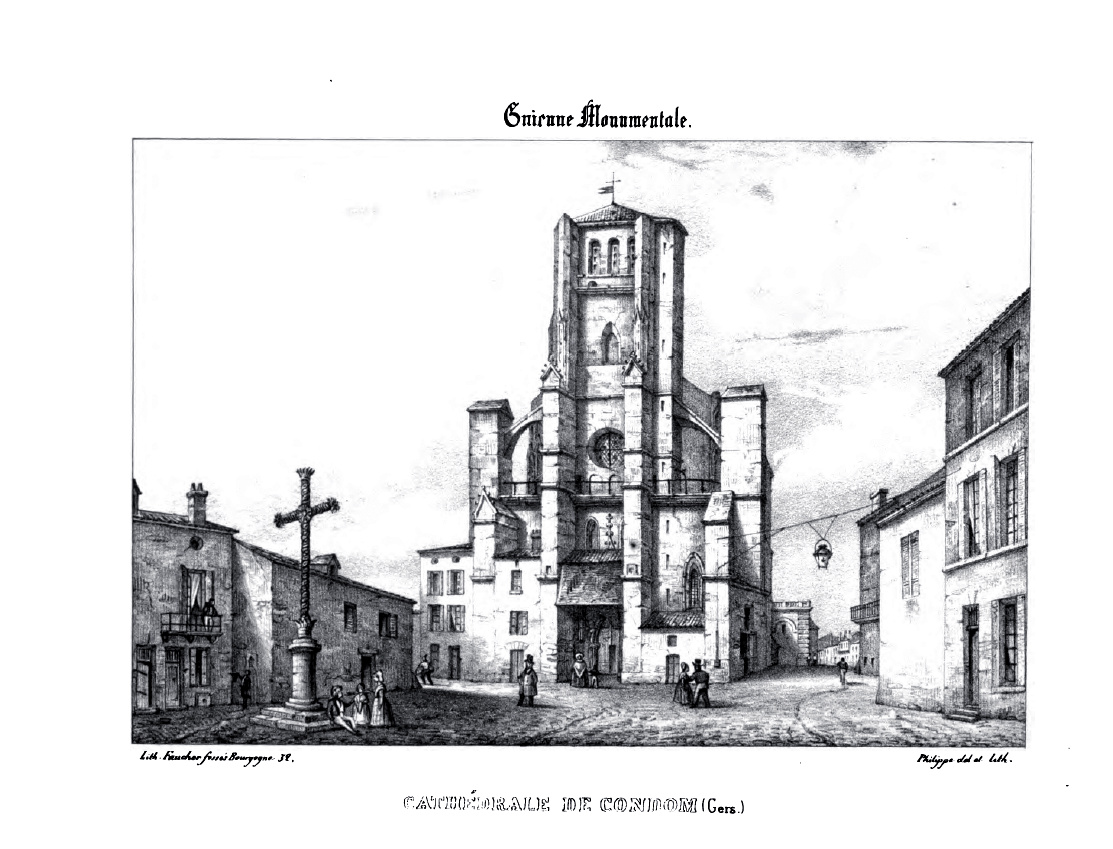 Eglise de Condom (Gers)